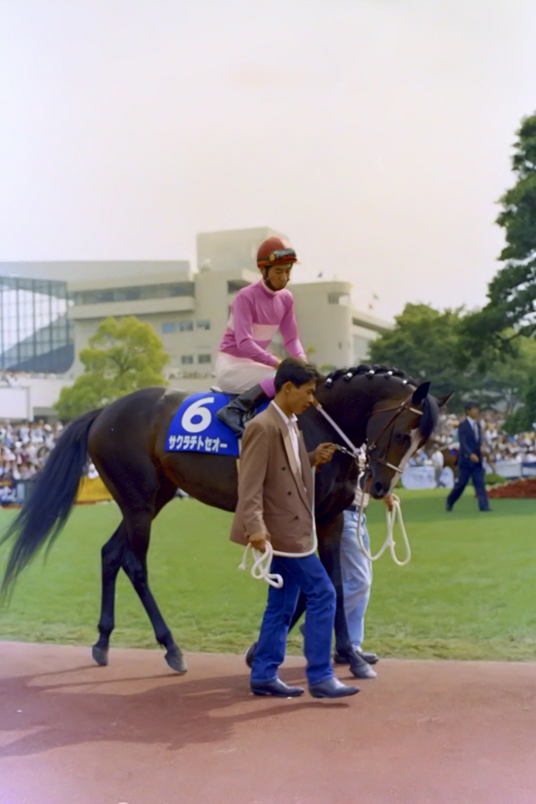 サクラチトセオー 1995年6月4日 京都競馬場